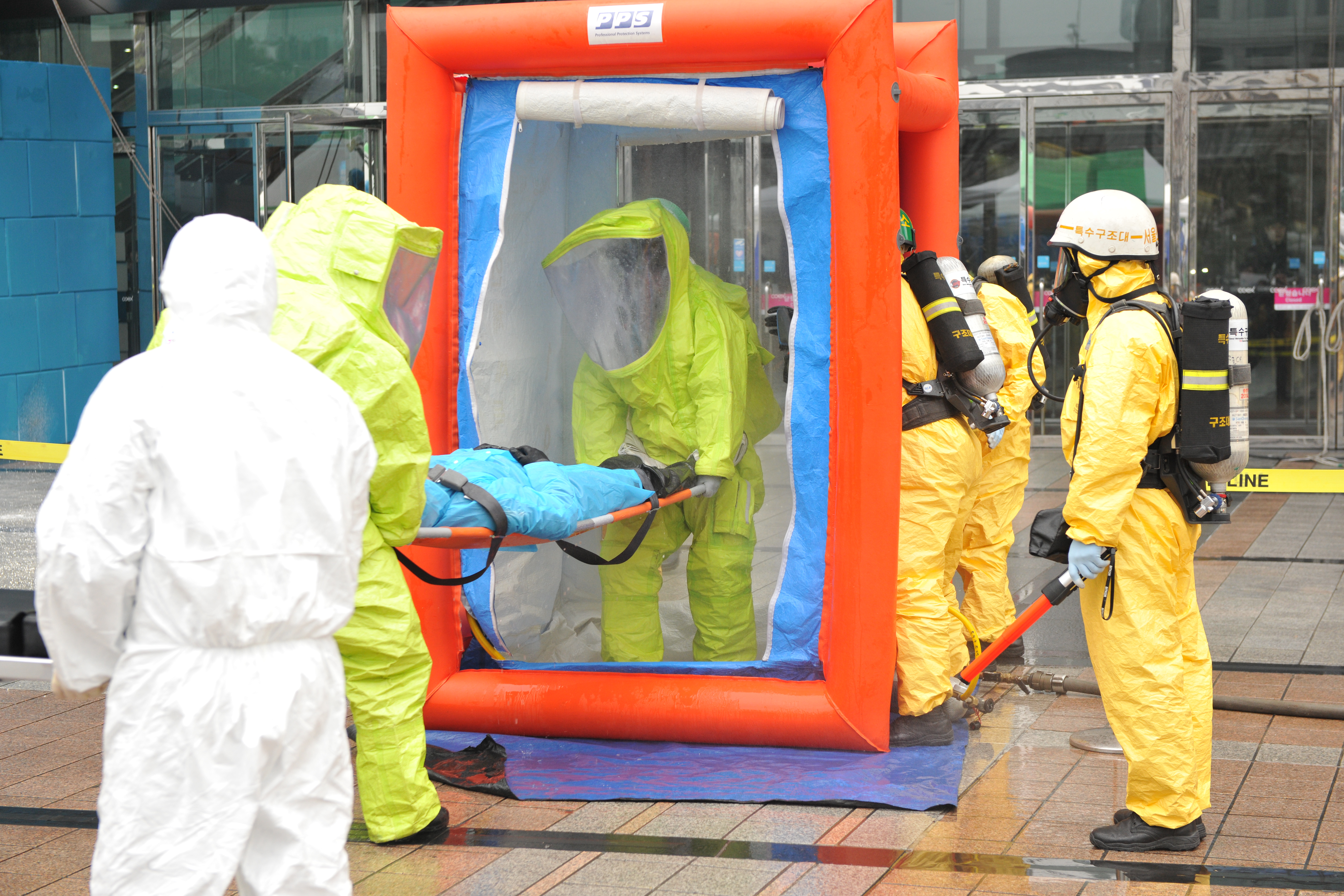 Photos of Seoul Metropolitan Fire & Disaster Headquarters